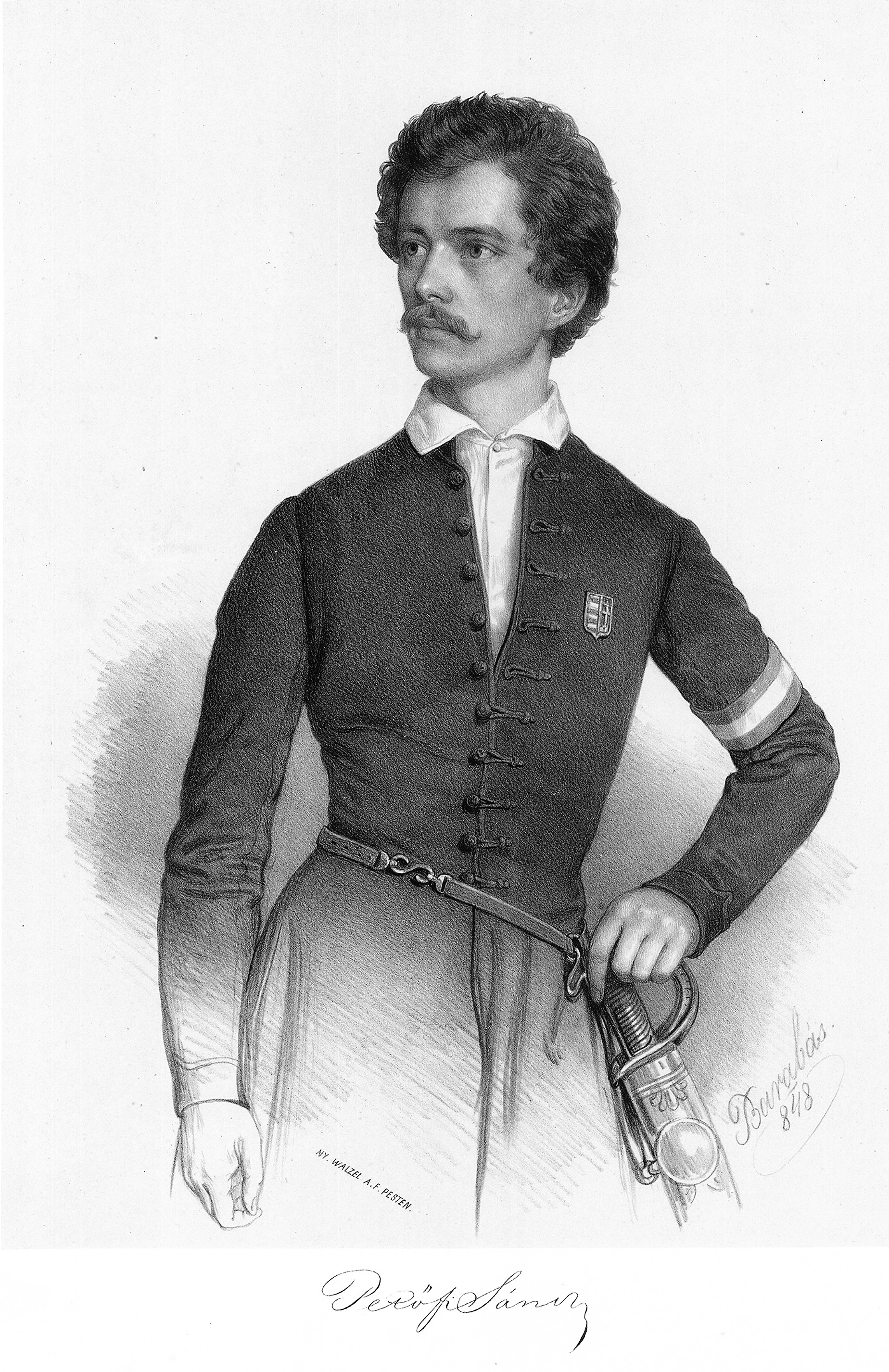 Petőfi Sándor 1848-ban (Barabás Miklós litográfiája)